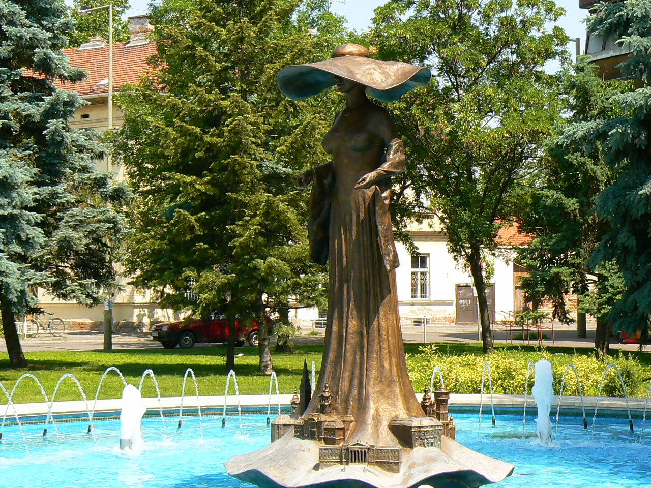 Szeged múzsájának szoknyáján Szeged nevezetes építményei láthatók